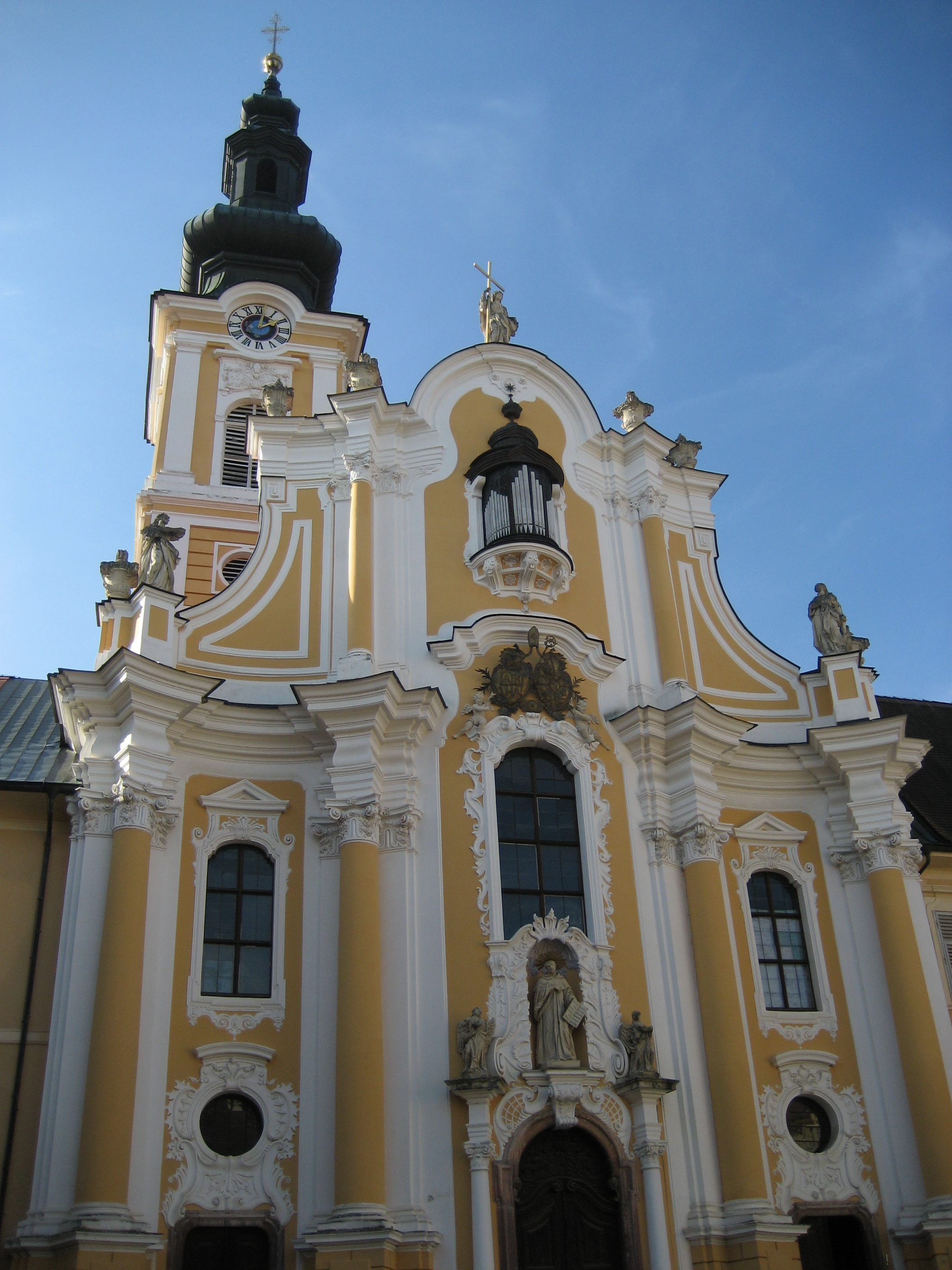 Stift Rein (in der Nähe von Graz, Österreich); Fassade der Stiftskirche